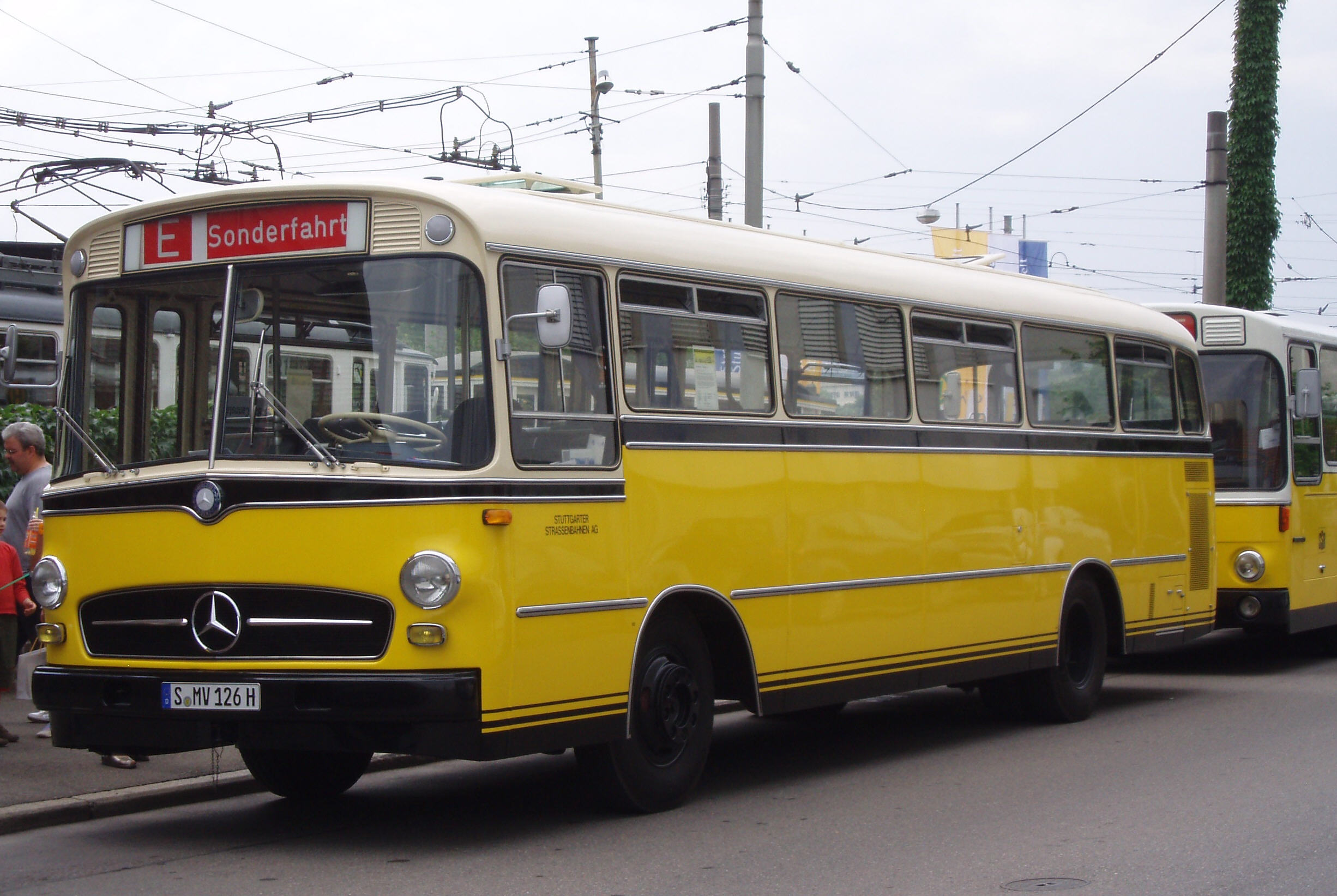 Eröffnung der Straßenbahnwelten Stuttgart, O 322, EZ 1961